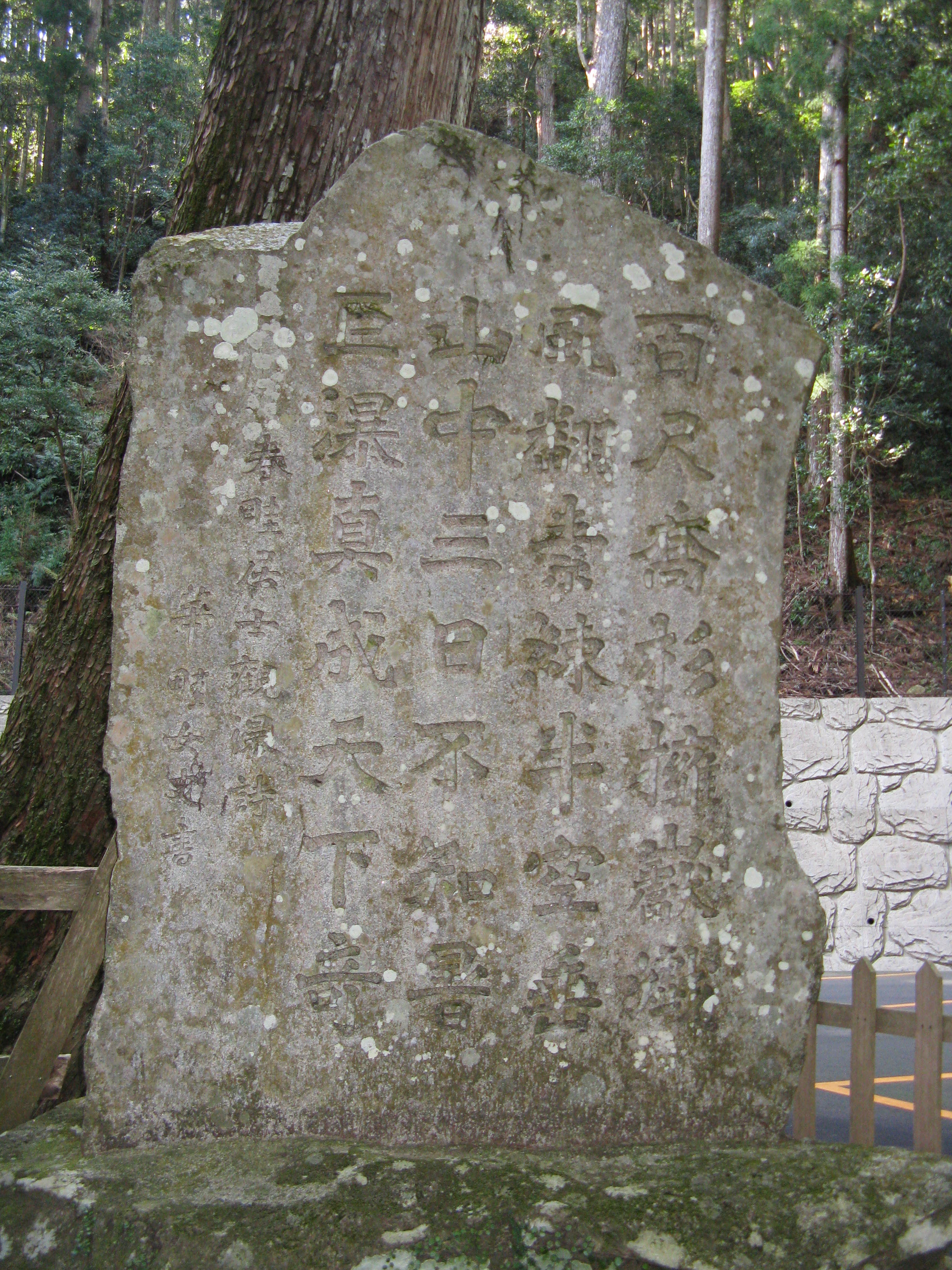 和歌山県那智勝浦町那智山飛瀧神社境内の春畦居士（諸井直行）観瀑詩碑、華畦女史（諸井久楽）書。